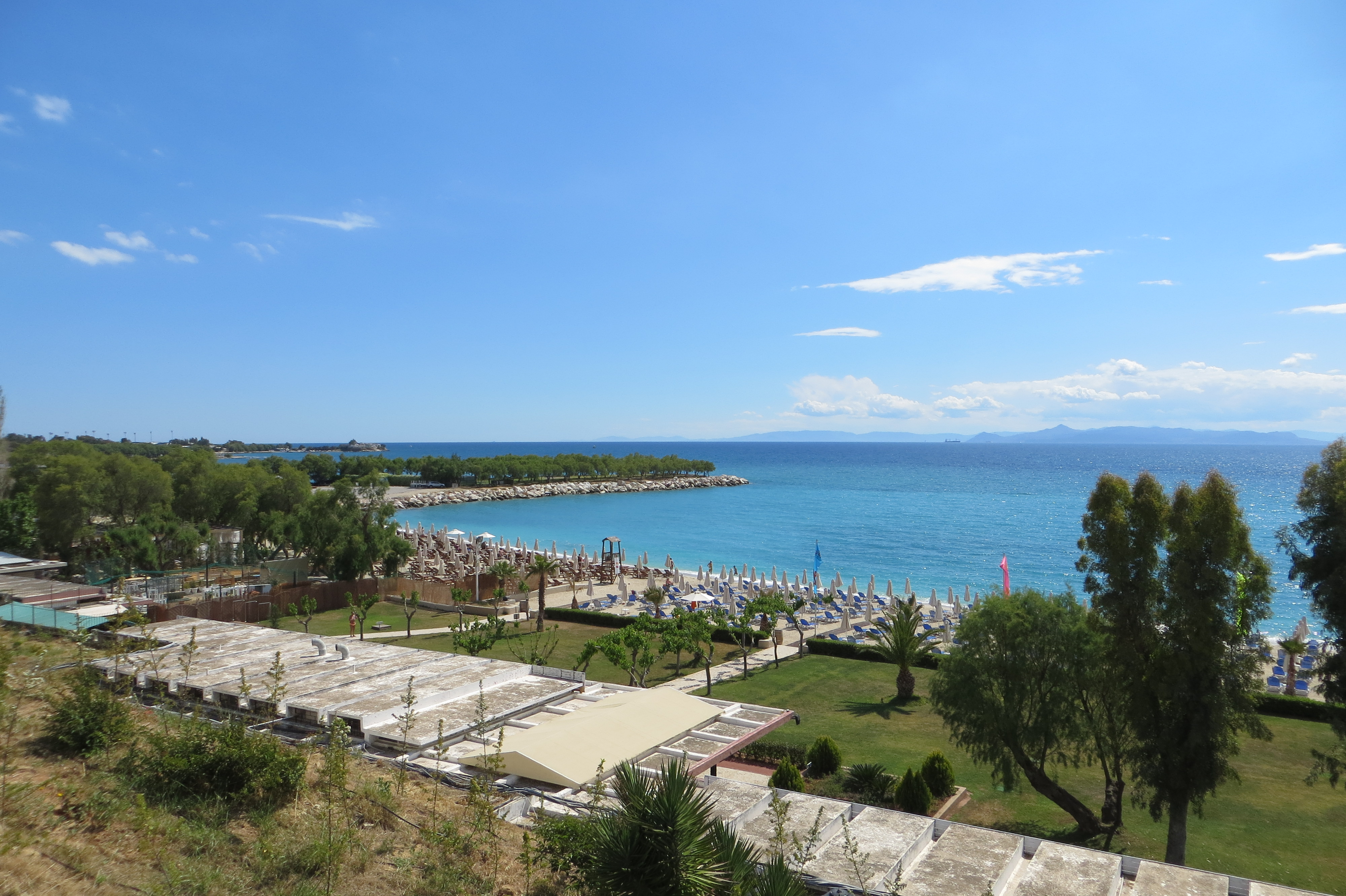 Alimos